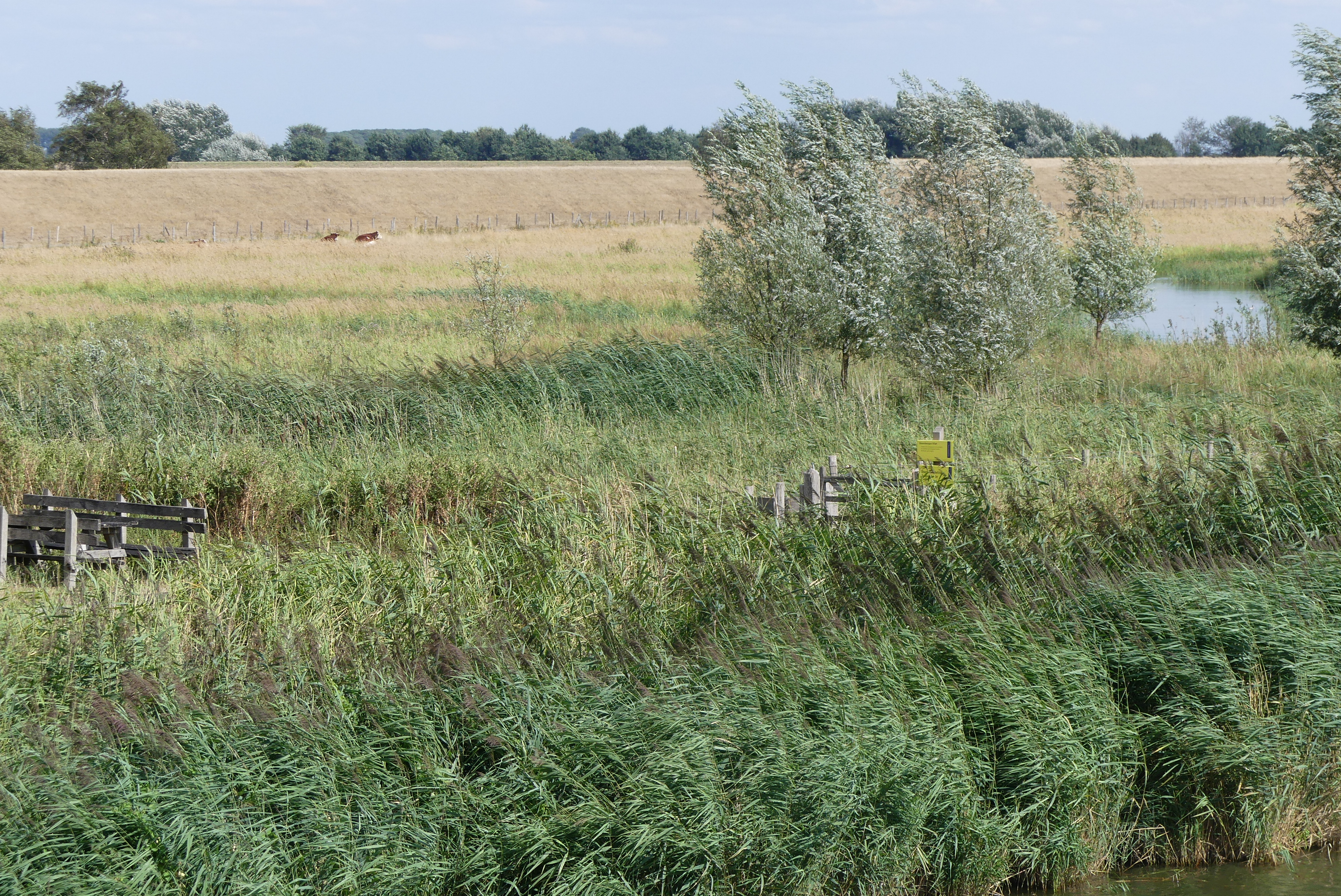 Zicht op een deel van natuurgebied de Dintelse Gorzen niet ver van de Volkerak in de provincie Noord-Brabant